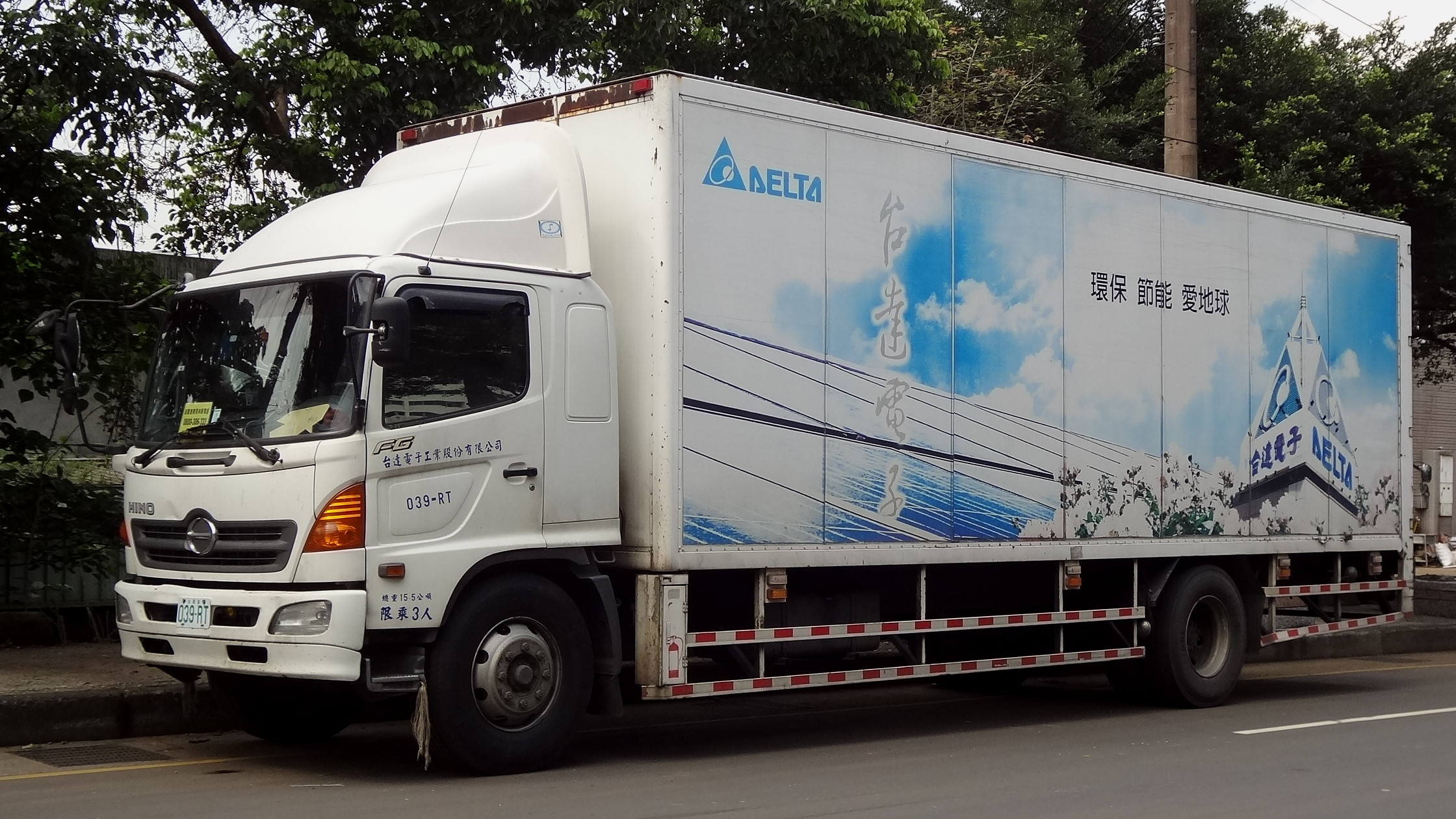 台達電子日野FG大貨車039-RT。